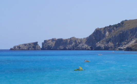 Cap des Freu